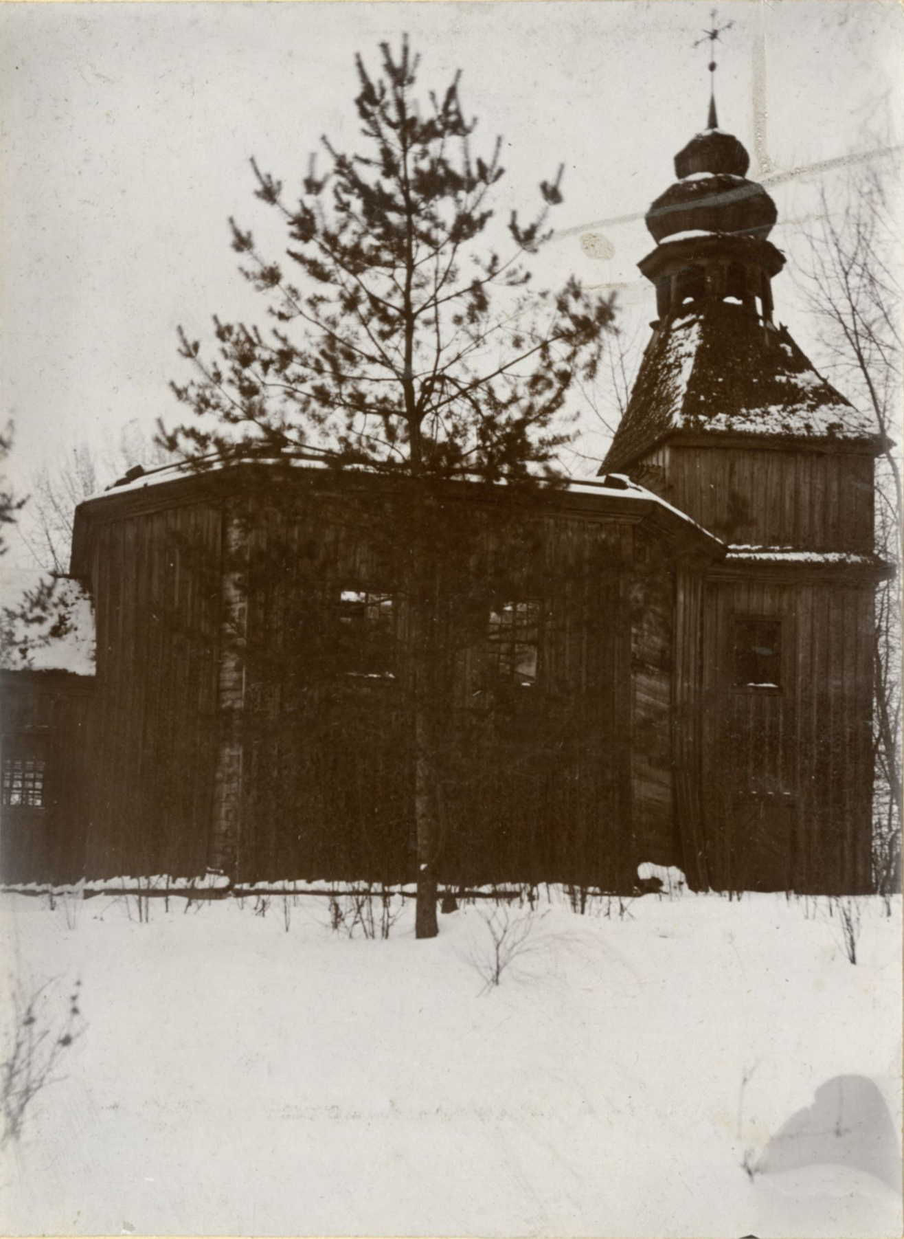 Беларуская (тарашкевіца): Упірэвічы (Upirevičy). Царква